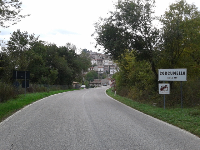 Ingresso del paese